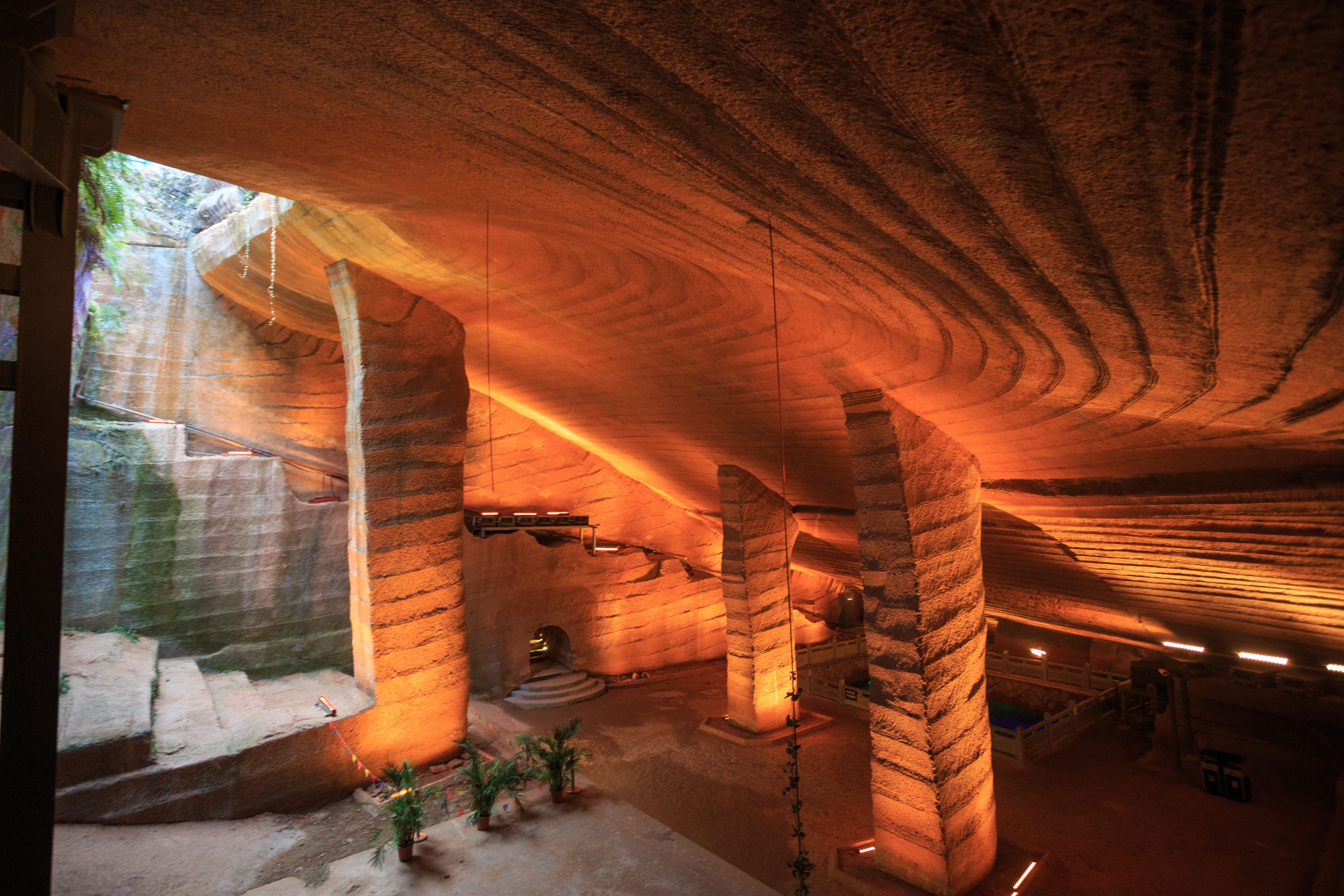 小南海石室 2号洞